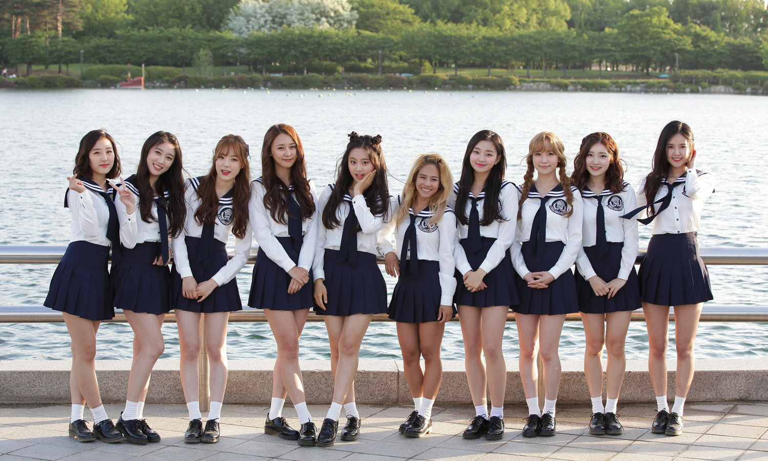 아이돌마스터.KR-꿈을 드림 (리얼걸 프로젝트(Real Girls Project) 일산 호수공원)